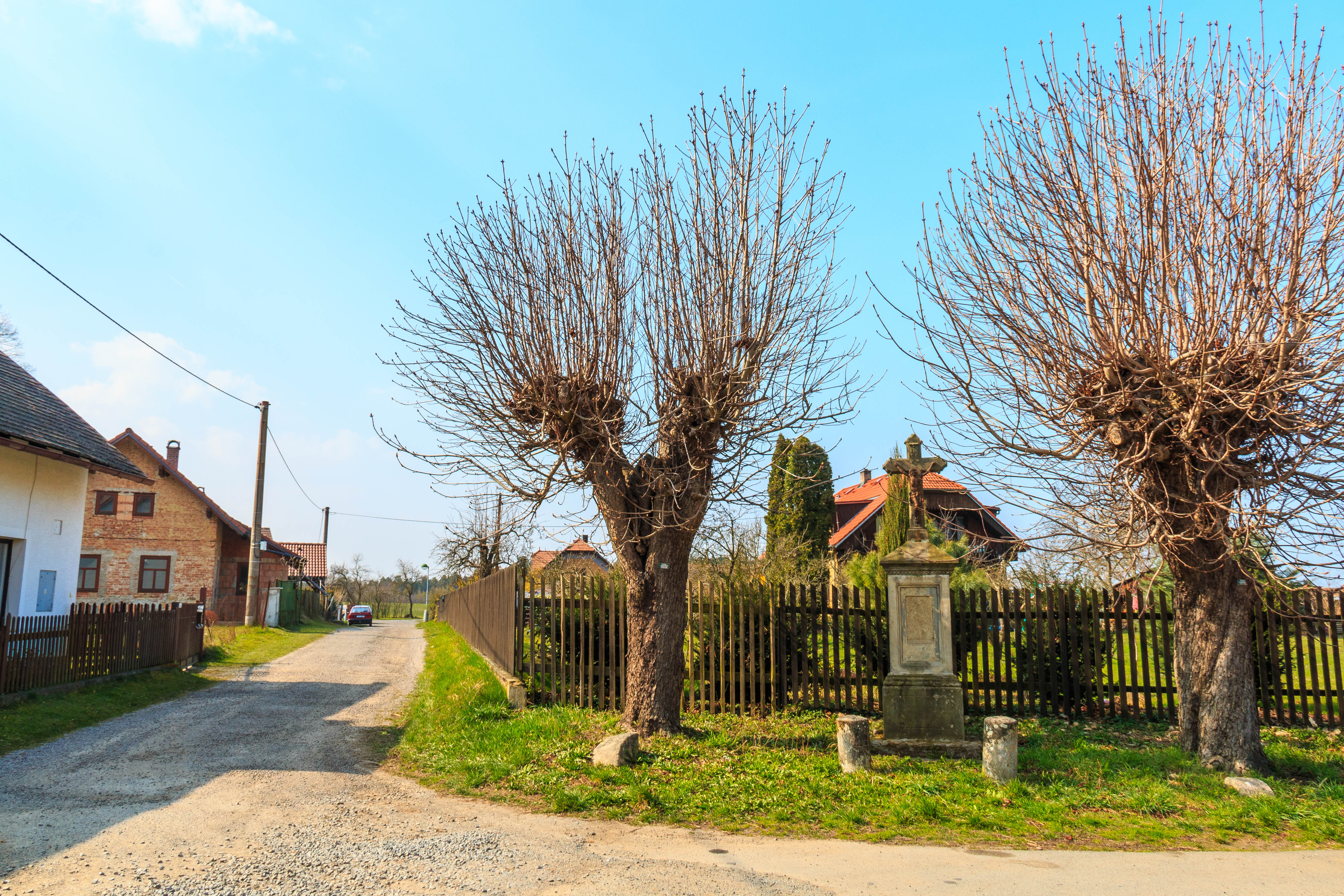 Studená Voda křížek